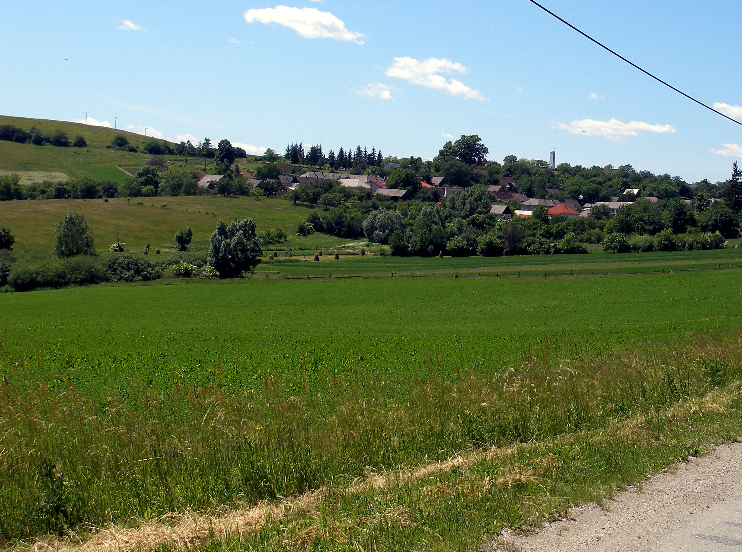 Obec Bodovce okres Sabinov